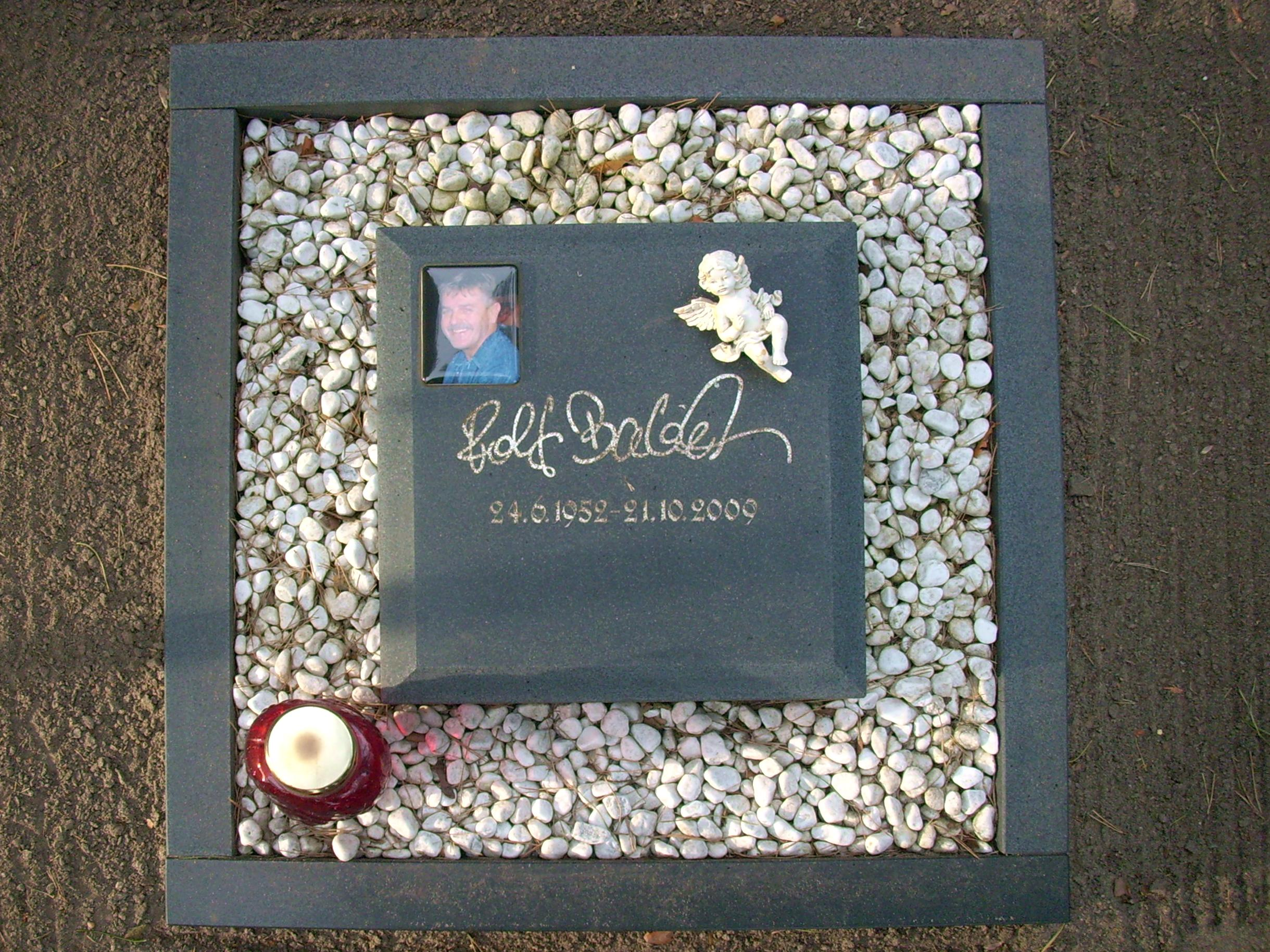 Grab des deutsch-US-amerikanischen Gastronomen Rolf Babiel (1952–2009) auf dem Waldfriedhof in Hoyerswerda